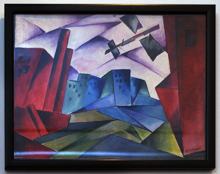 Я. Гуминер. Эскиз декорации к проекту Идея труда